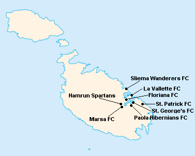 Répartition des clubs en First Division Maltaise 1960-1961.